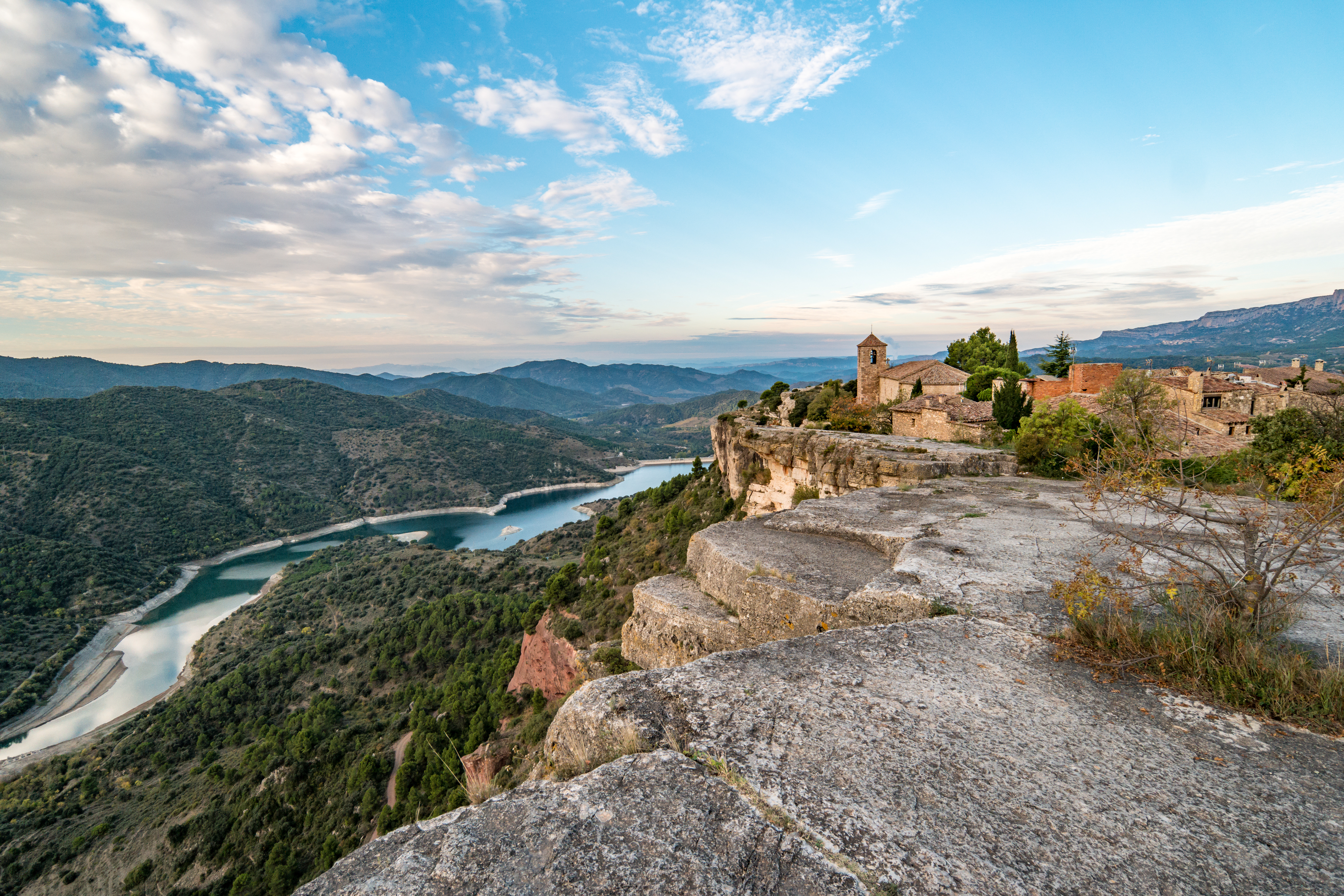 Siurana, Blick auf die Kirche